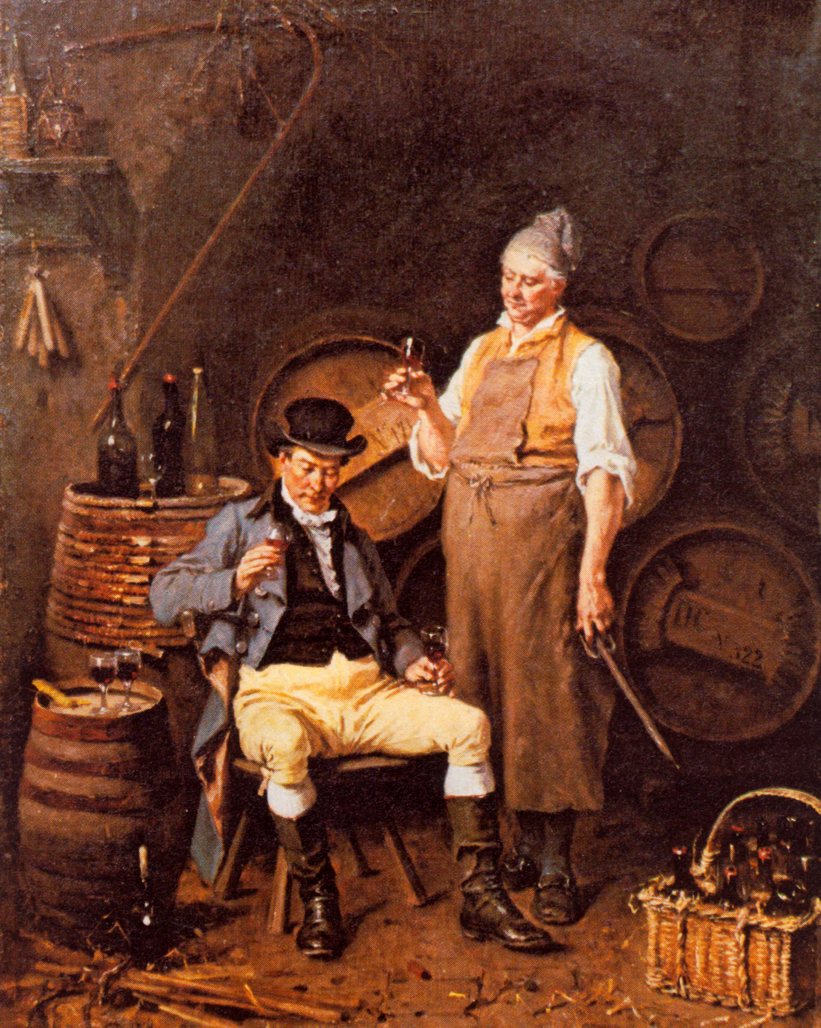 Les goûteurs de vin par Jan David Col (1822-1900)